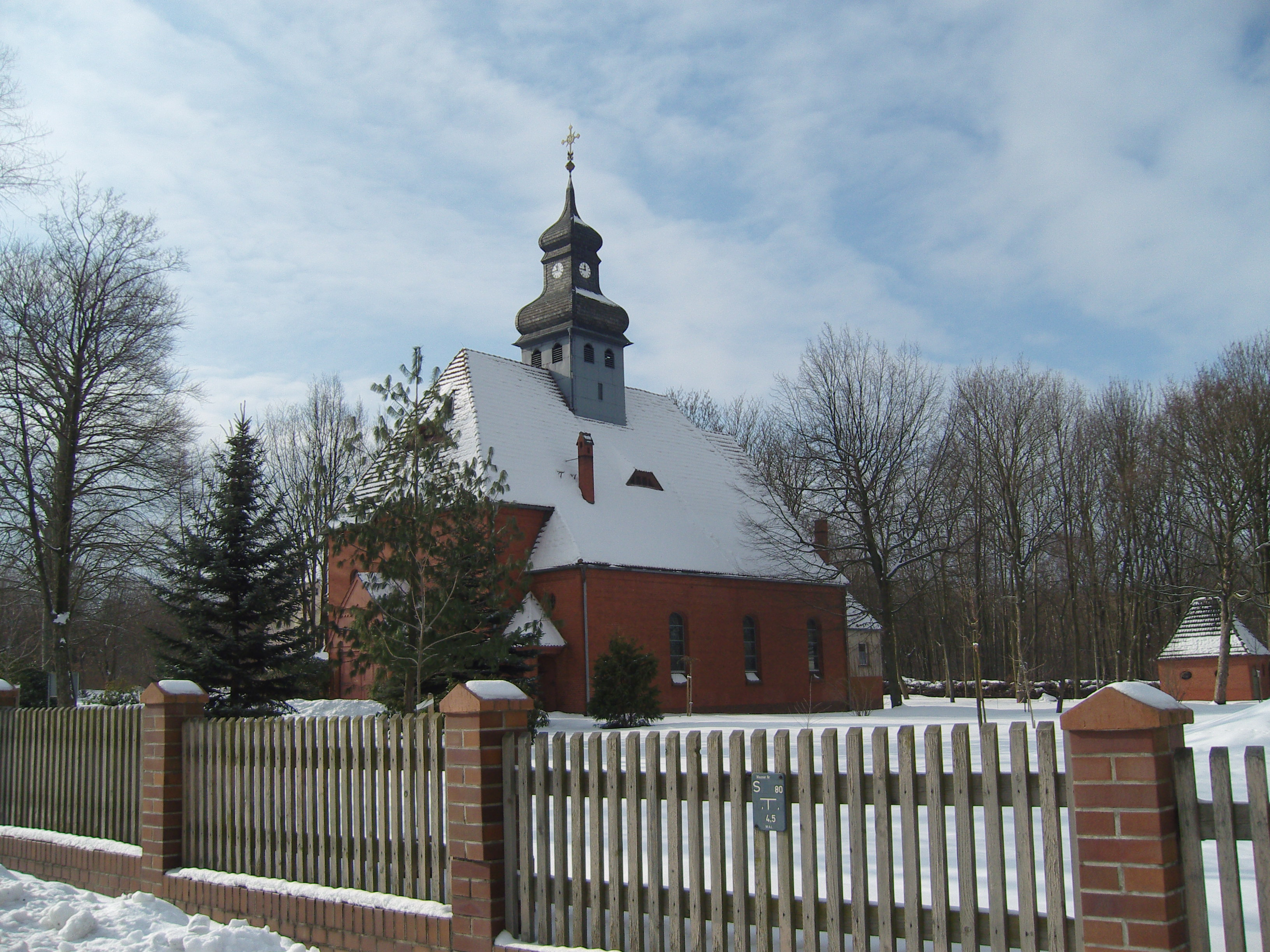 Katholische Herz-Jesu-Kirche in Klettwitz - Baudenkmal